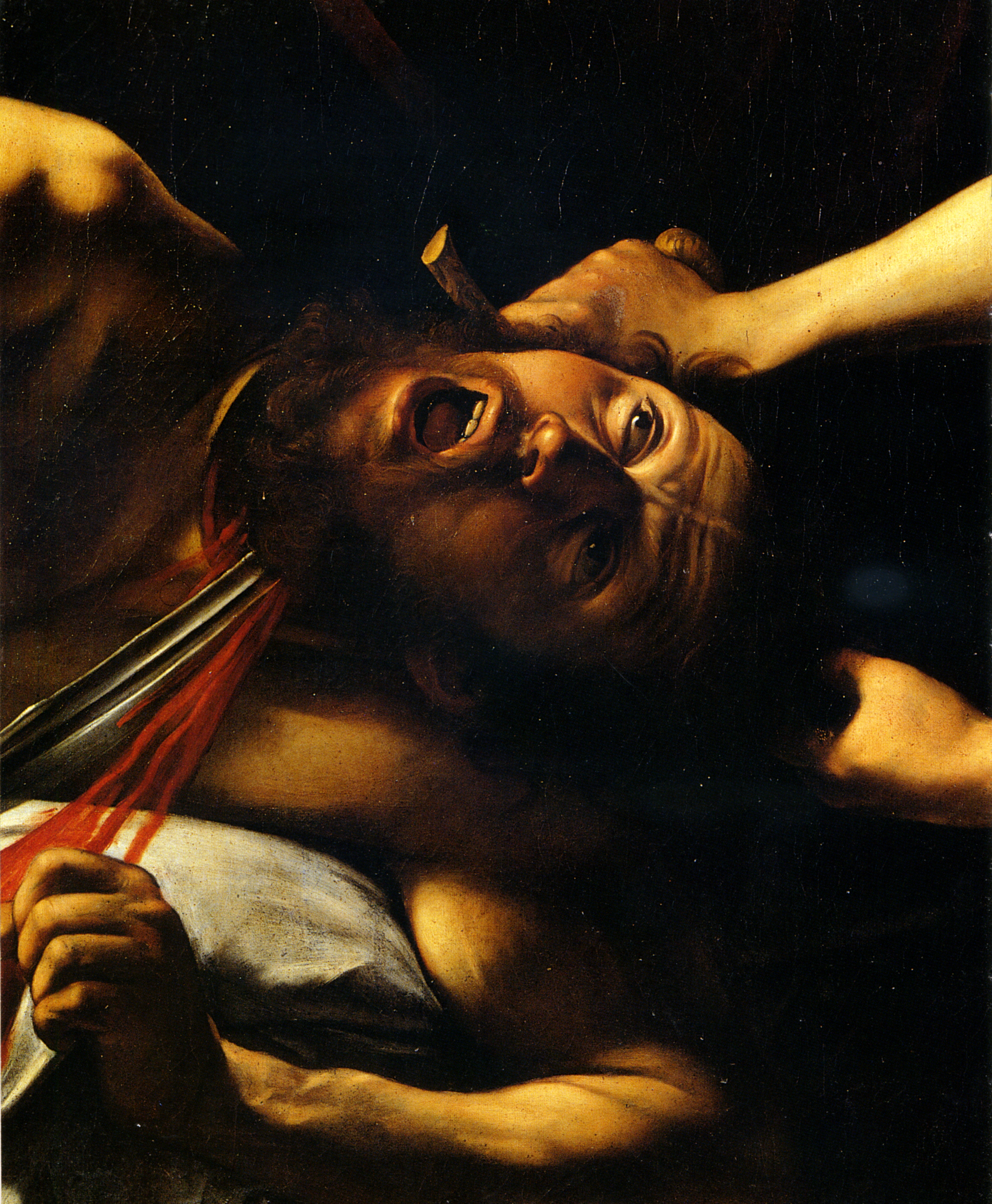 Giuditta e Oloferne (particolare) Caravaggio: Roma, Galleria Nazionale d'Arte Antica Palazzo Barberini